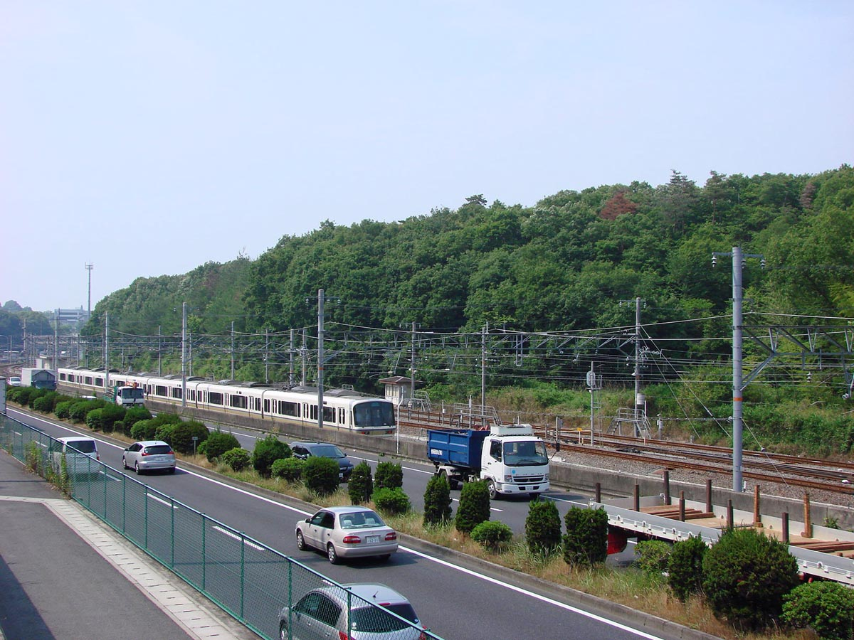 ＪＲ西日本 佐保信号場